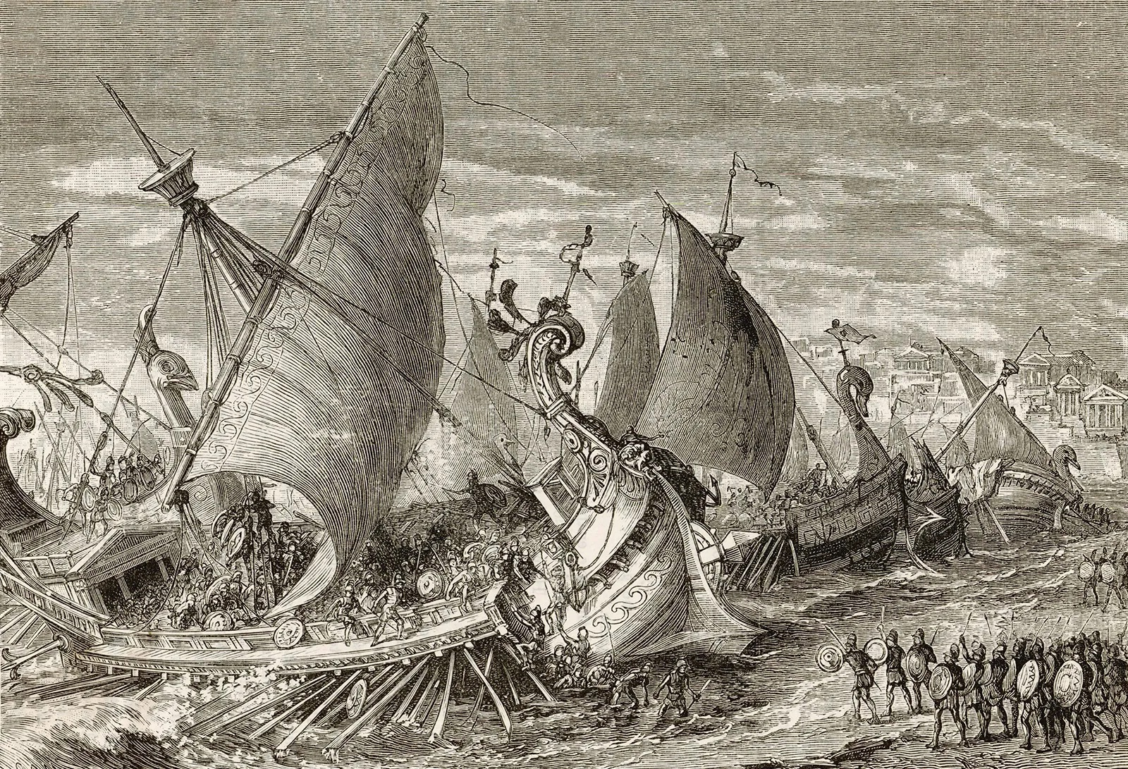 La battaglia navale di Atene contro Siracusa in Sicilia nel 415 a.C. durante la Guerra del Peloponneso